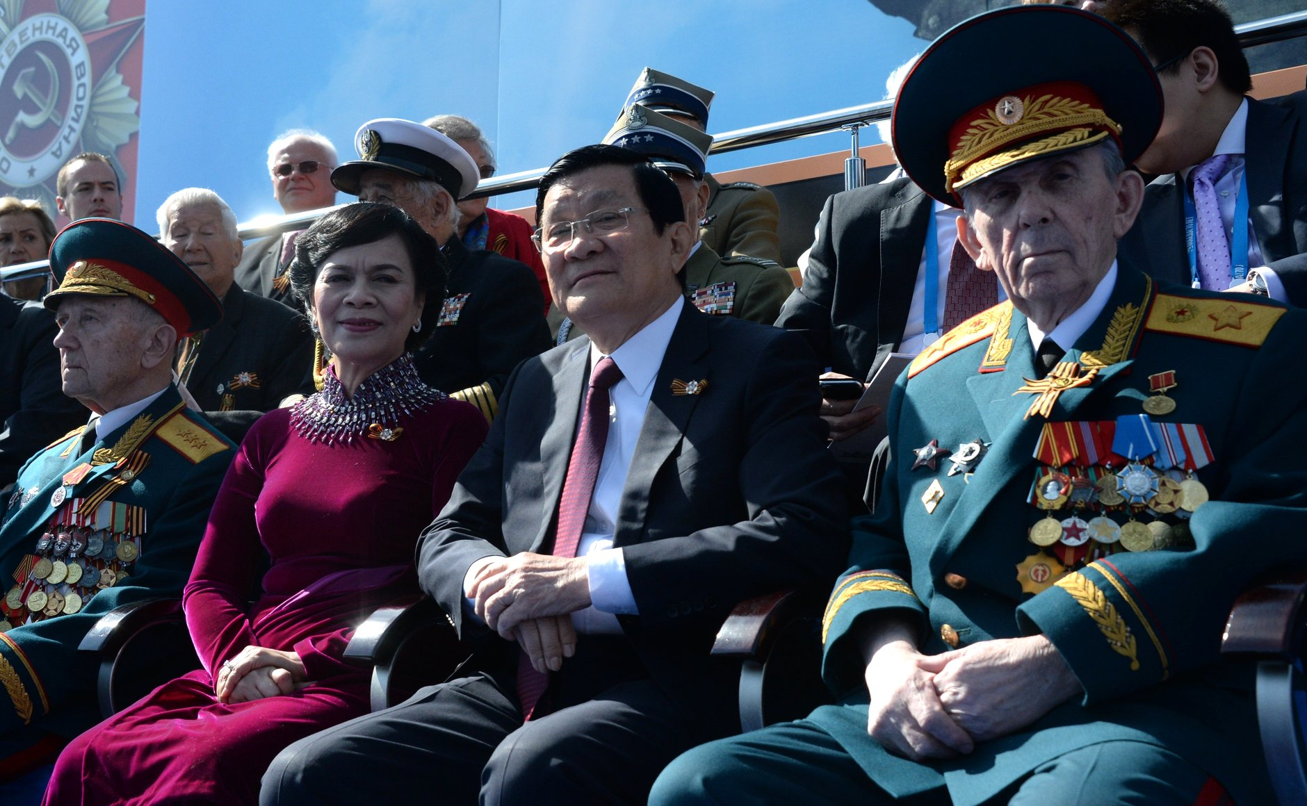 Военный парад в ознаменование 70-й годовщины Победы в Великой Отечественной войне 1941–1945 годов. Президент Социалистической Республики Вьетнам Чыонг Тан Шанг.